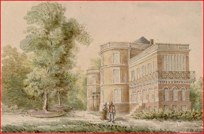 Le château de Querrieu. Aquarelle de Oswald Macqueron, d'après nature, le 7 juin 1870.